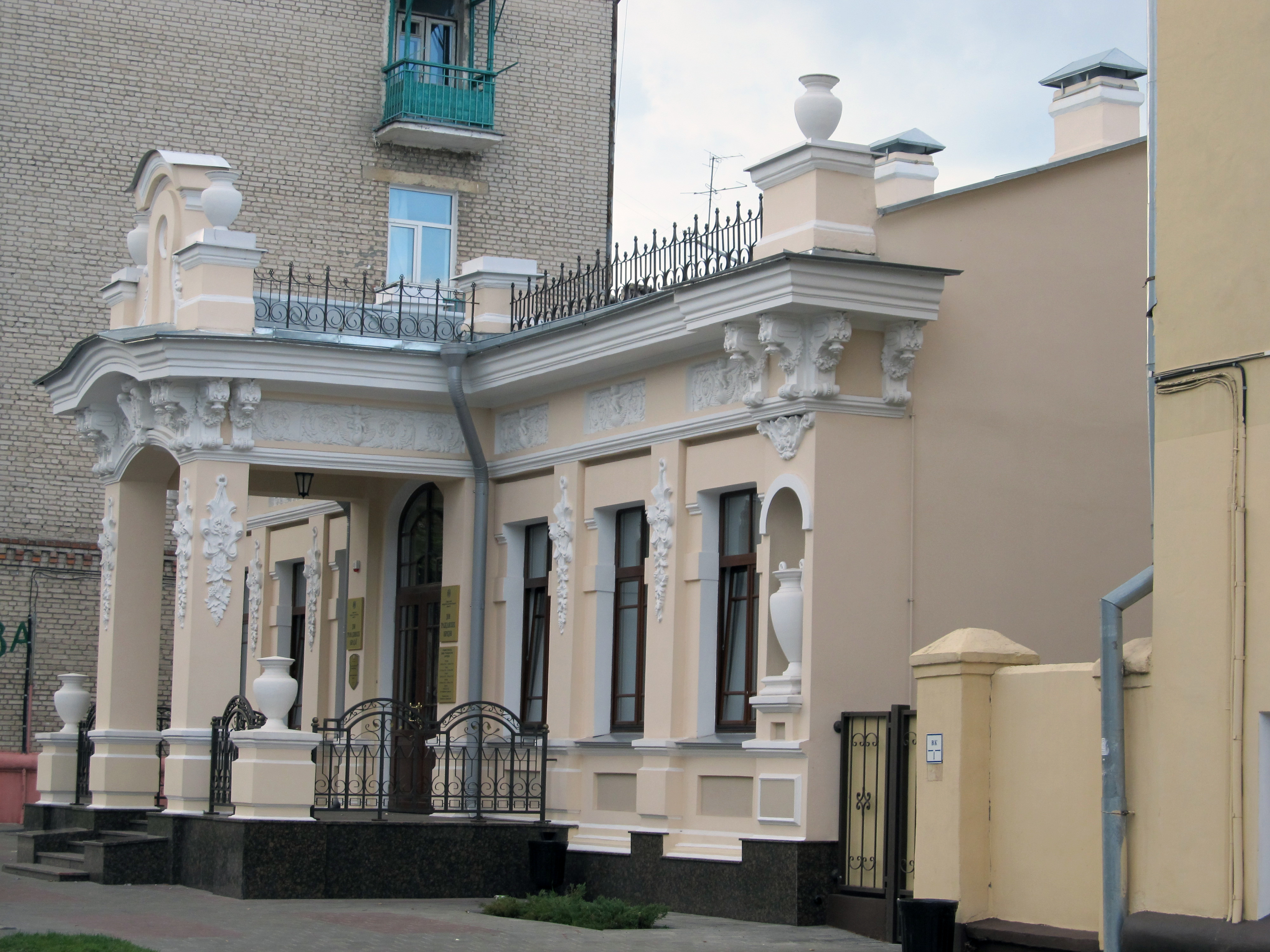 Беларуская (тарашкевіца): Былы будынак лекара. г. Гомель This is a photo of Belarusian heritage monument. Reference number: 313Г000020 ( WLM)